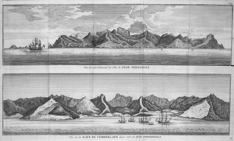 [Illustrations de Voyage autour du monde] Auteur : George Anson Éditeur : Henri-Albert Gosse et Compagnie (Genève) 1750